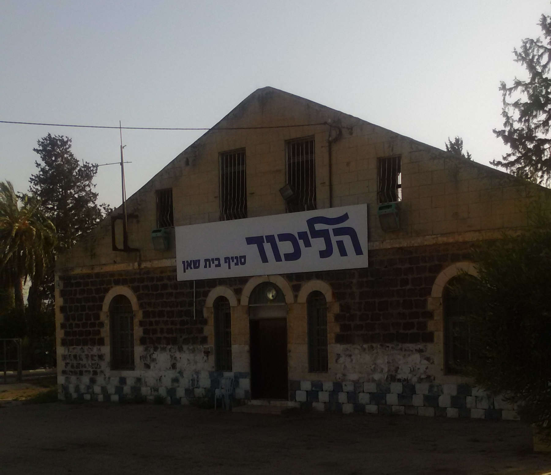 מקום הפיגוע בסניף הליכוד